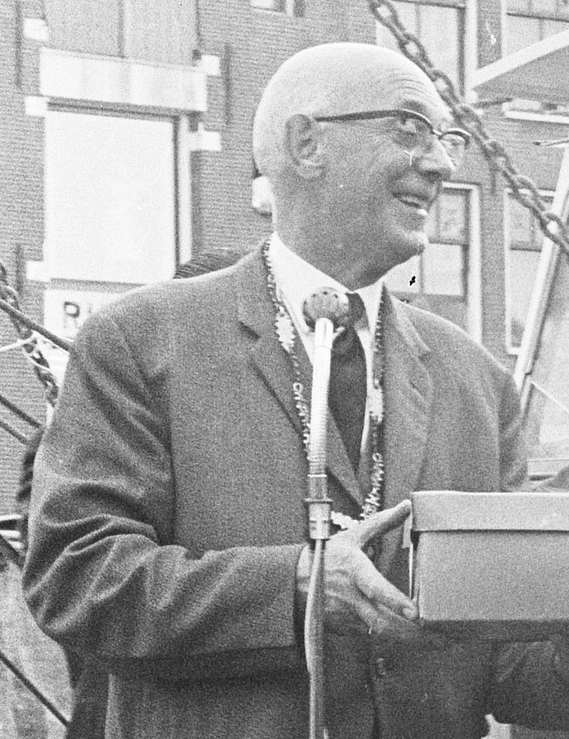 Collectie / Archief : Fotocollectie Anefo Reportage / Serie : [ onbekend ] Beschrijving : 350 jaar bestaan Jordaan. Aankomst kotter. Burgemeester van Hall ontvangt van burgemeester van Wieringen een doos, in midden mevrouw van Hall / Datum : 26 augustus 1963 Locatie : Amsterdam, Noord-Holland Trefwoorden : aankomsten, dozen, ontvangsten Persoonsnaam : Hall, Gijs van, Jordaan Fotograaf : Gelderen, Hugo van / Anefo Auteursrechthebbende : Nationaal Archief Materiaalsoort : Negatief (zwart/wit) Nummer archiefinventaris : bekijk toegang 2.24.01.05 Bestanddeelnummer : 915-4790 Reacties Geplaatst door Maaike op 23 juni 2013 - 16:46. 350 jaar bestaan Jordaan. Aankomst Wieringer kotter. Burgemeester van Hall ontvangt van burgemeester Schellinger van Wieringen een doos met vis, in midden mevrouw E. van Hall-Nijhoff. Persoonsnamen: C.J. Schellinger; E. van Hall-Nijhoff